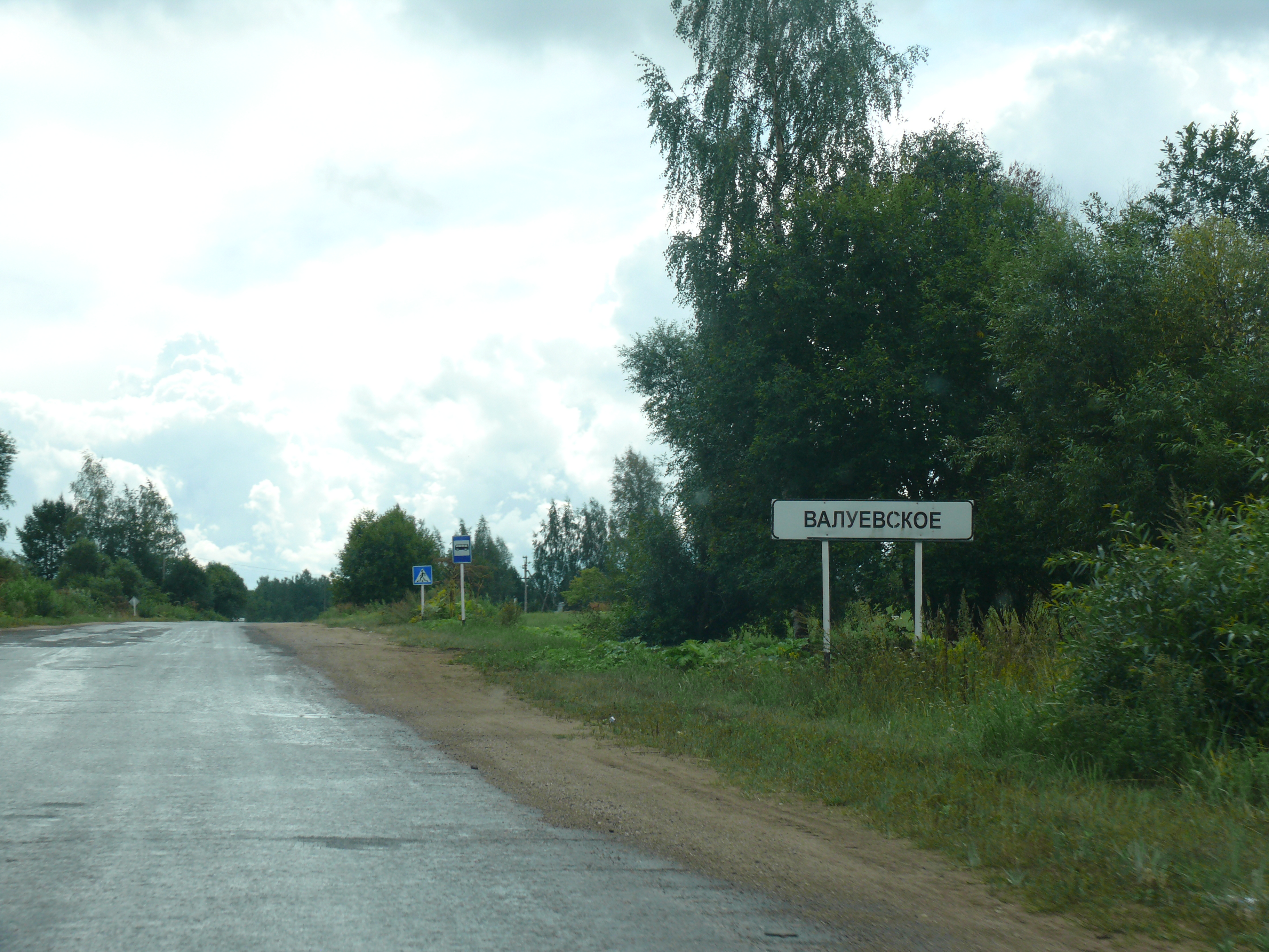 Въезд в деревню Валуевское (Локнянский район Псковской области) со стороны Локни